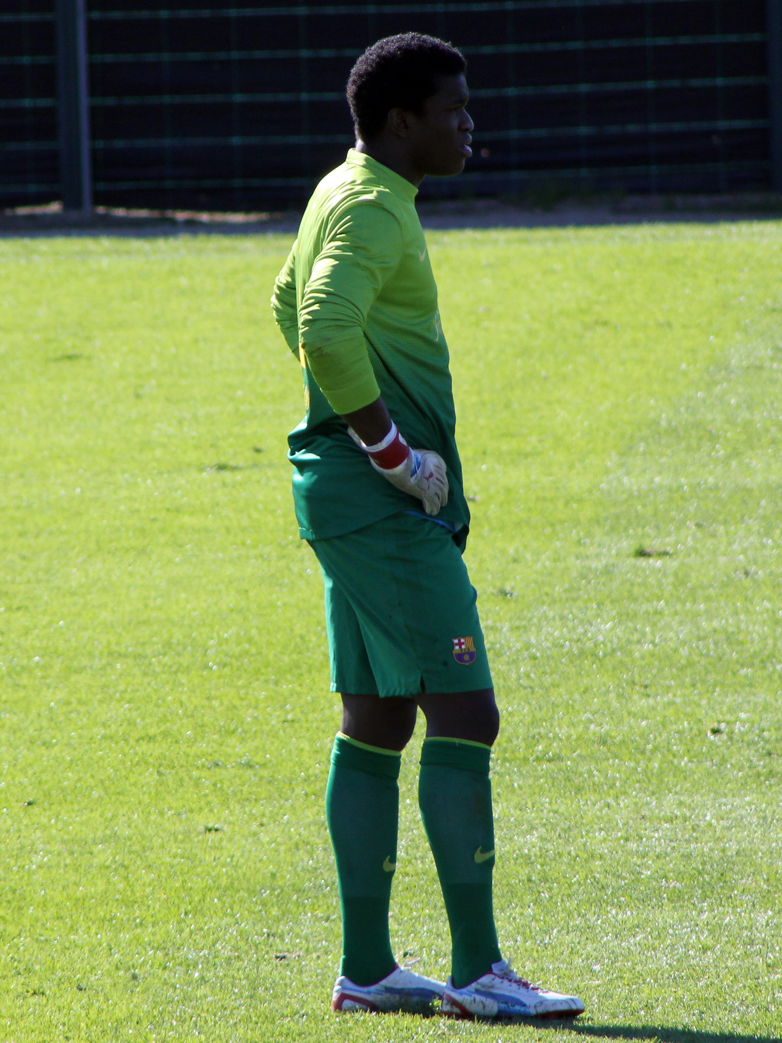 Foto realizada por Javier Segura (@castroquini)